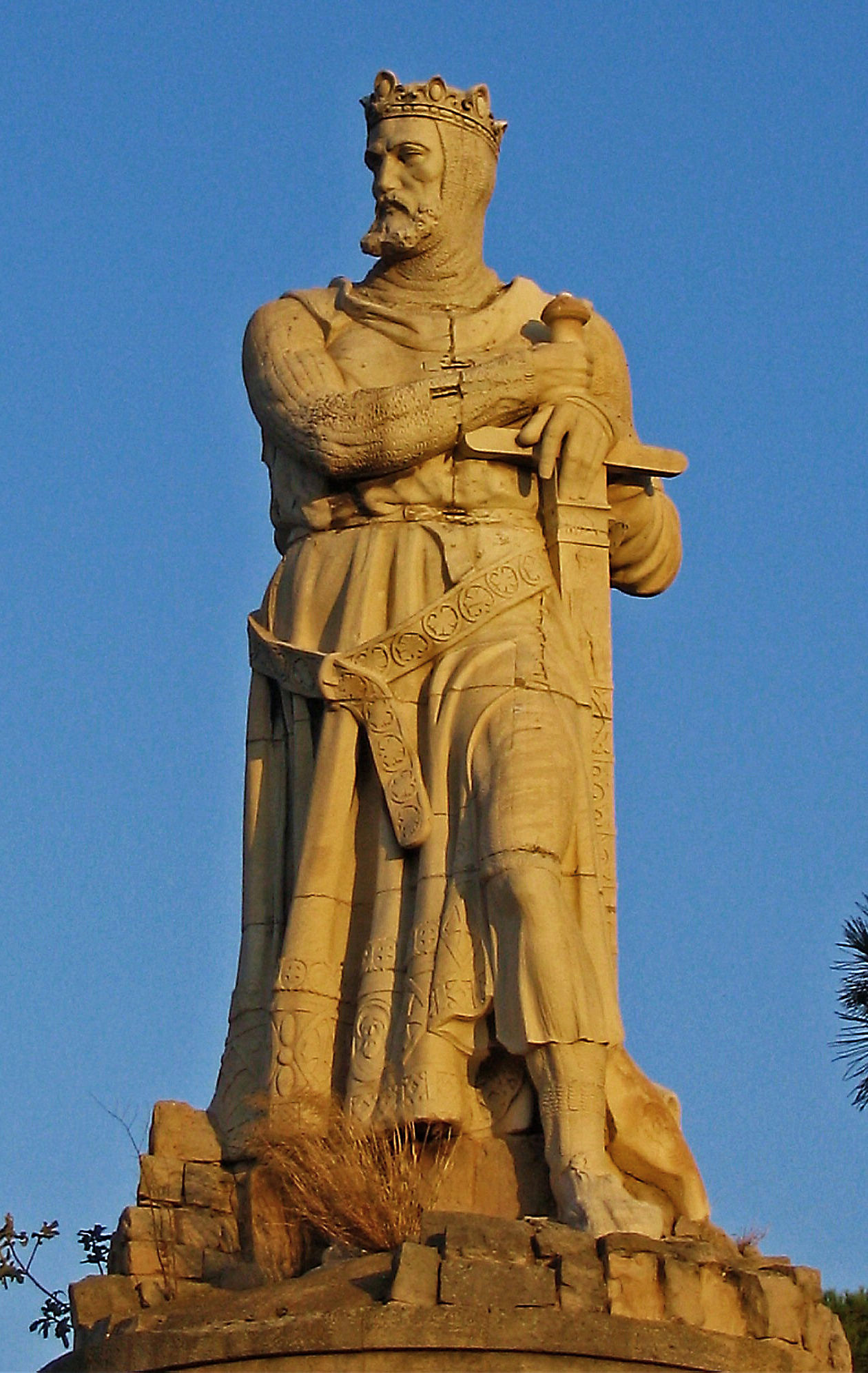 Estatua de Alfonso I El Batallador en el Parque Grande José Antonio Labordeta de Zaragoza.